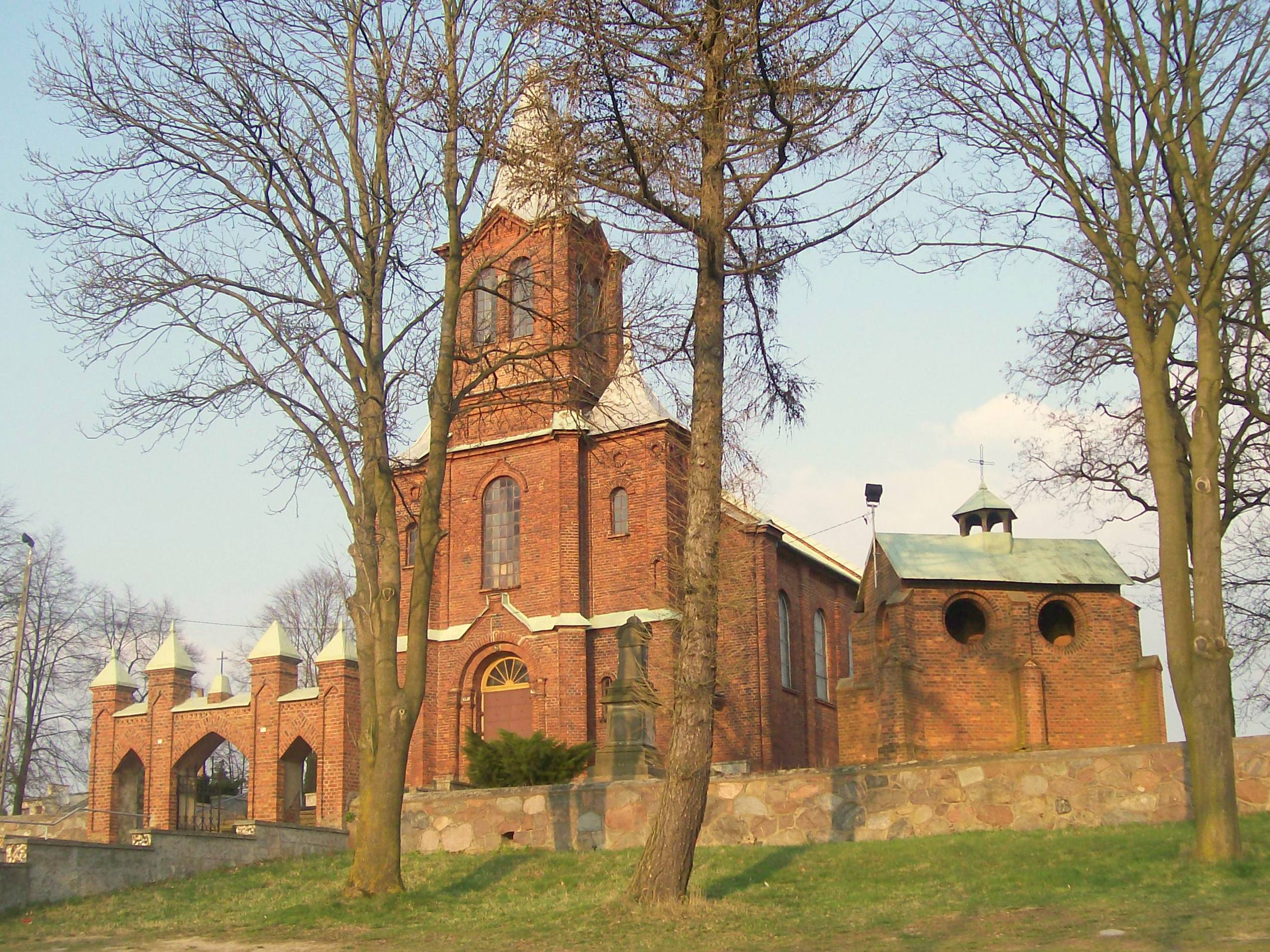 Kurowo (pow. sierpecki) - kościół śś. Apostołów Piotra i Pawła